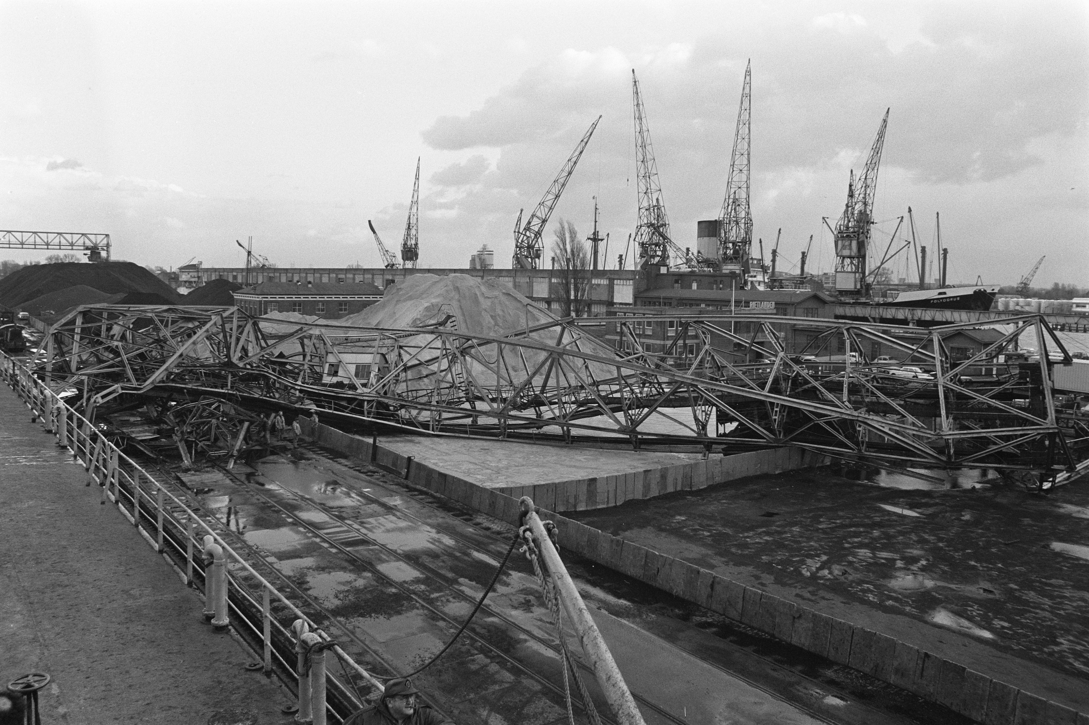 Collectie / Archief : Fotocollectie Anefo Reportage / Serie : [ onbekend ] Beschrijving : Kraan omgevallen in Amsterdamse haven door zware storm Datum : 13 november 1972 Trefwoorden : havens, ongevallen Fotograaf : Verhoeff, Bert / Anefo Auteursrechthebbende : Nationaal Archief Materiaalsoort : Negatief (zwart/wit) Nummer archiefinventaris : bekijk toegang 2.24.01.05 Bestanddeelnummer : 926-0180